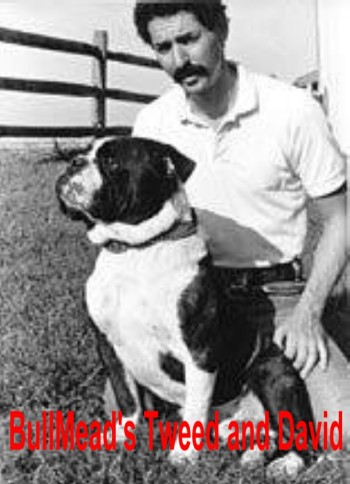 David Leavitt and his BullMead's Tweed, one of the foundation dogs used for developing his Leavitt bulldog breed (not an actual Leavitt bulldog)